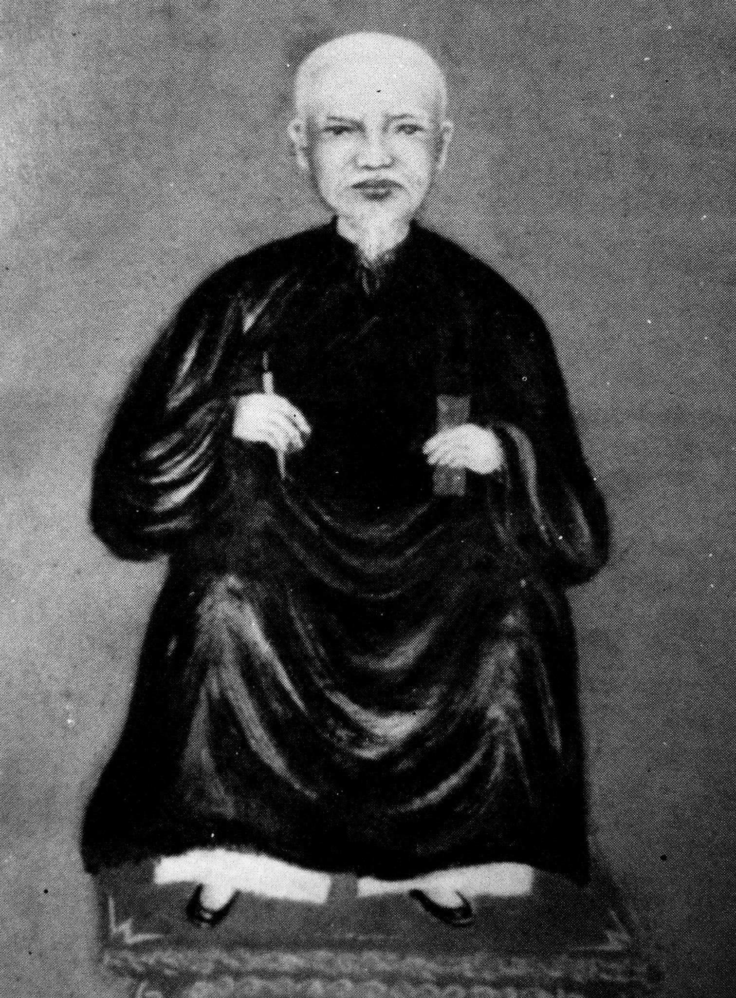 Chân dung ngài Hàn Lâm viện Thị giảng học sĩ Phạm Đình Hổ (范廷琥, 1768 - 1839), quàn tại từ đường Phạm Đình tộc (thôn Hòa Ché, xã Hùng Thắng, huyện Bình Giang, tỉnh Hải Dương, Việt Nam).